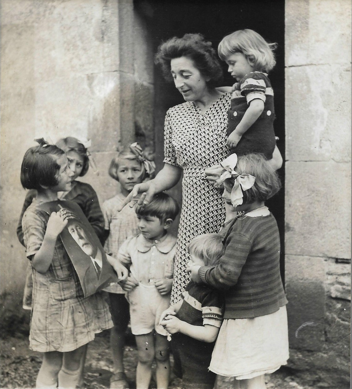 Sept enfants photographiés avec leur mère, regardant le portrait du maréchal Philippe Pétain. Photo de presse, agence Trampus, bureau de Vichy, sans date (entre 1940 et 1944), format 13 x 18 cm.